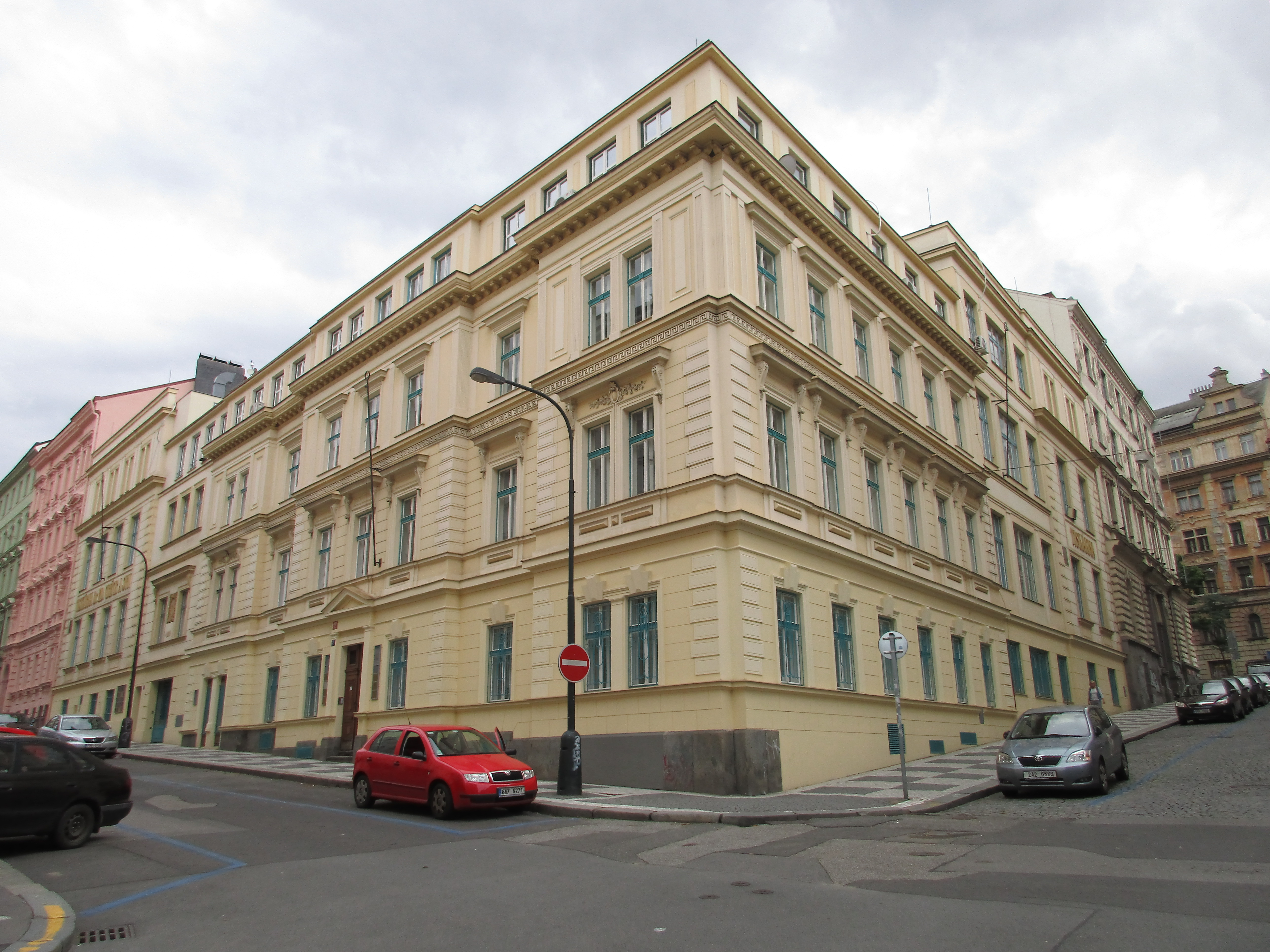 Dr. Eduard Grégr a syn, knihtiskárna v Praze, Hálkova 2 - V Tůních 4, Praha 2 - Nové Město